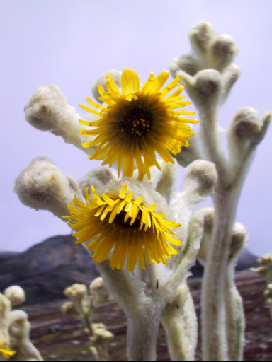 Image of shrub Espeletia schultzii